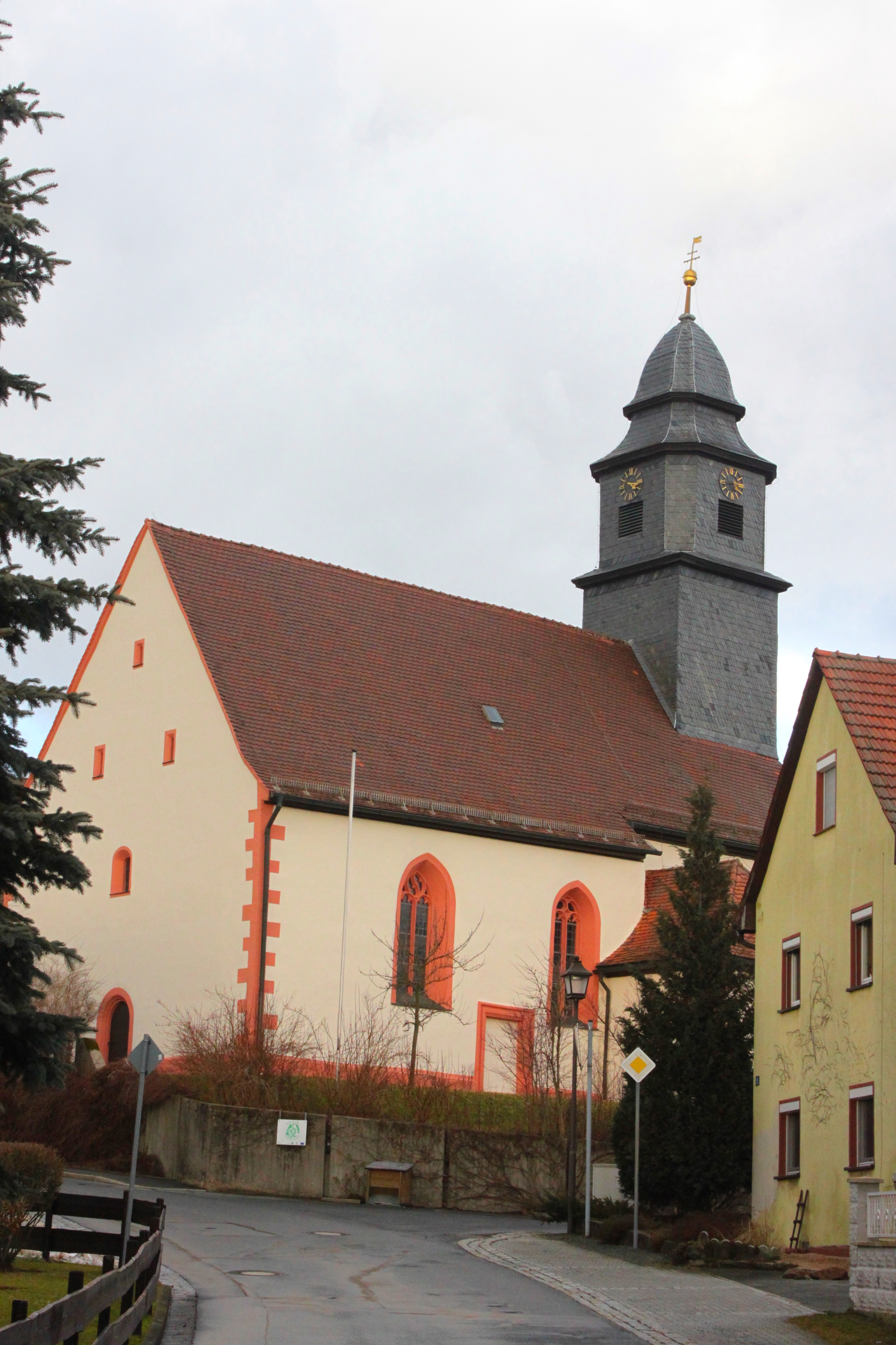 Katholische Pfarrkirche St. Bartholomäus in Ludwigschorgast